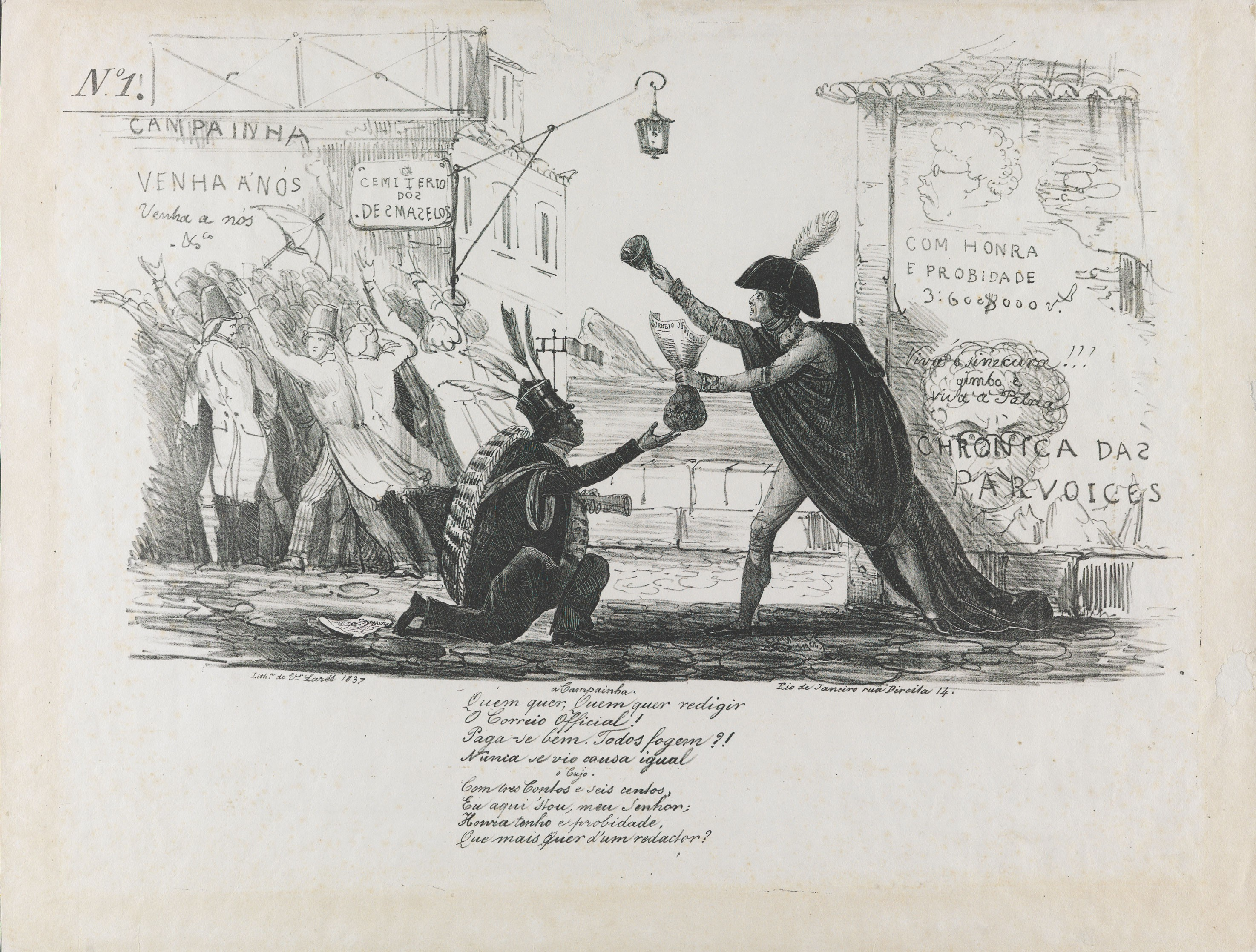 Primeira caricatura publicada no Brasil, em 1836, por Manuel de Araújo Porto-alegre, em 1836, mostra as disputas políticas do período regencial.